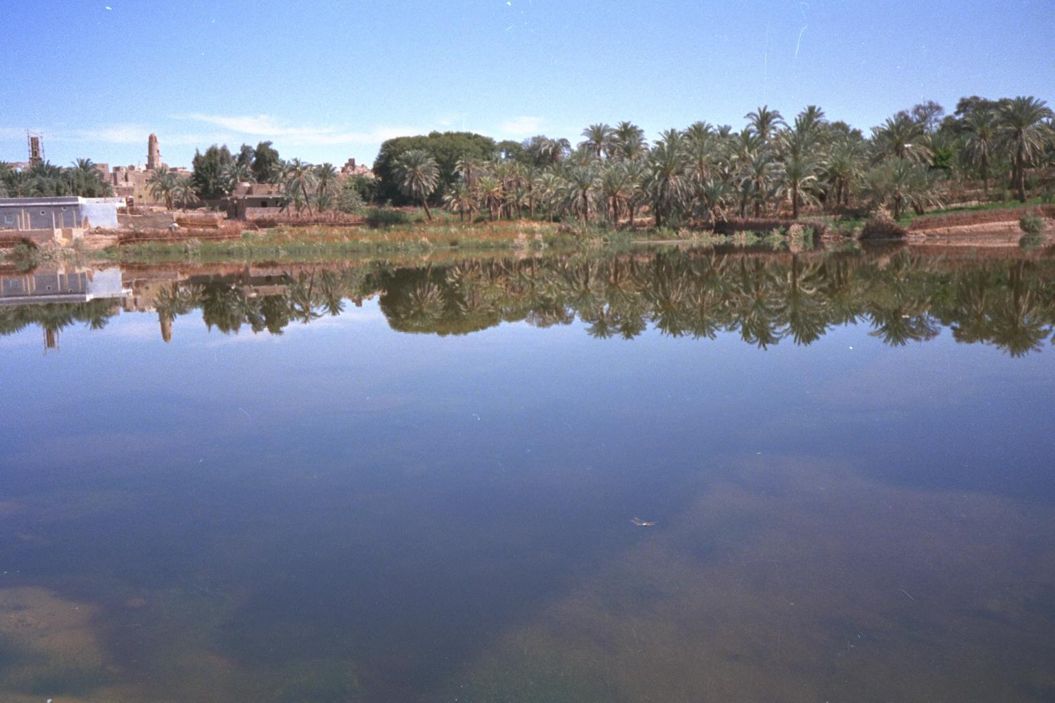 Dakhla Oasis, Egypt